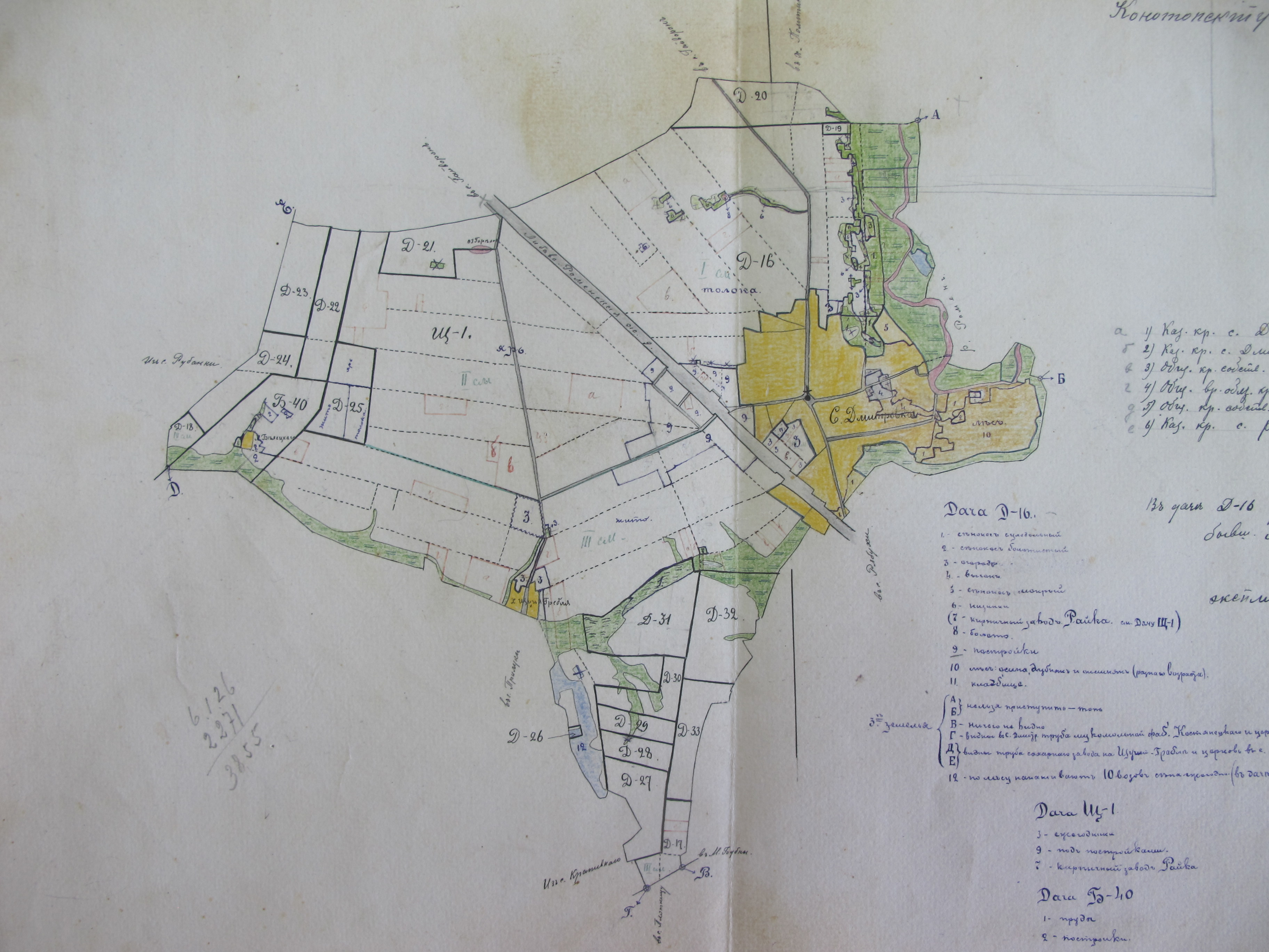 Дмитрівка, землемірський план Контопського повіту, 1905 р.